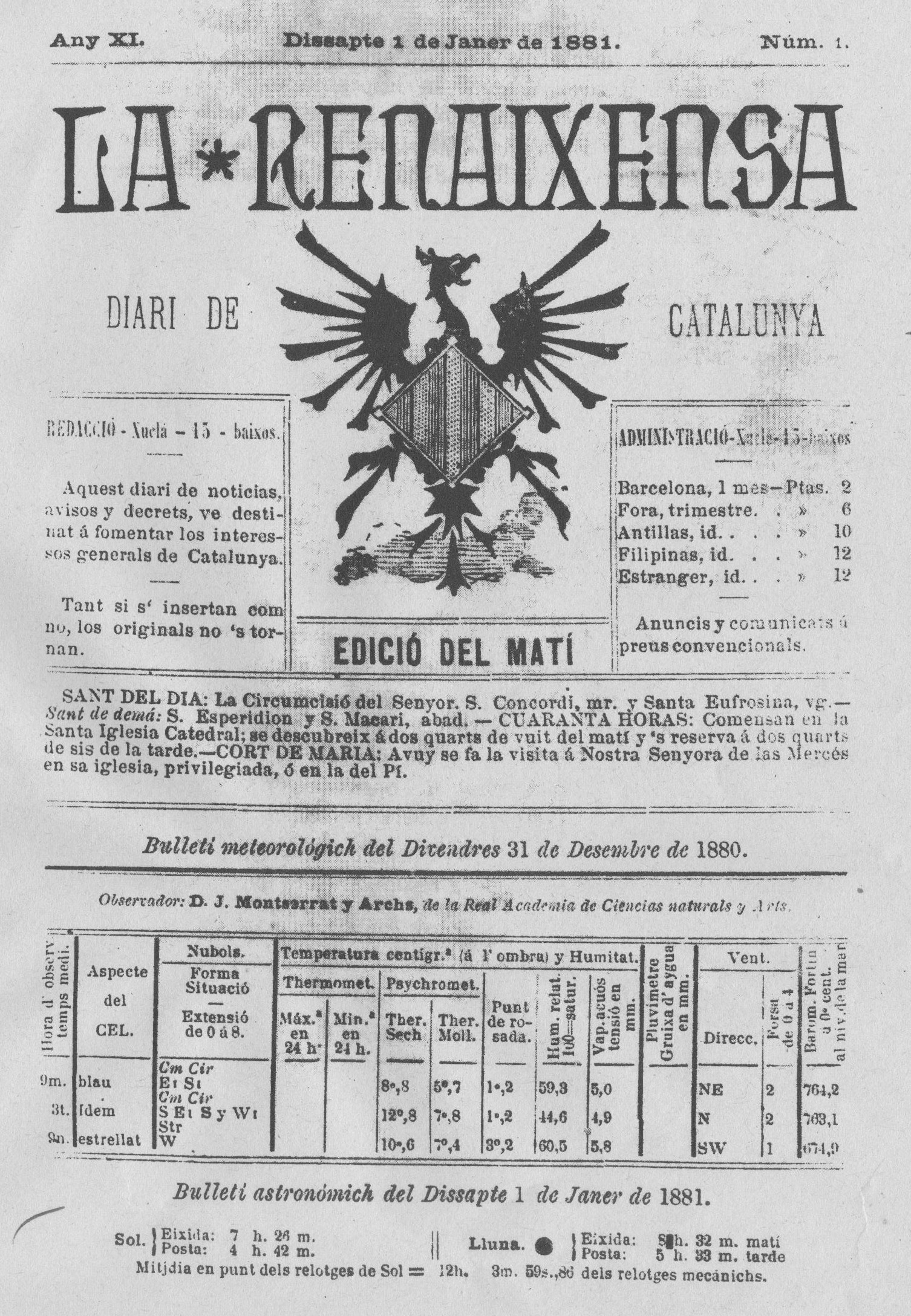 Portada del número 1 de La Renaixensa.